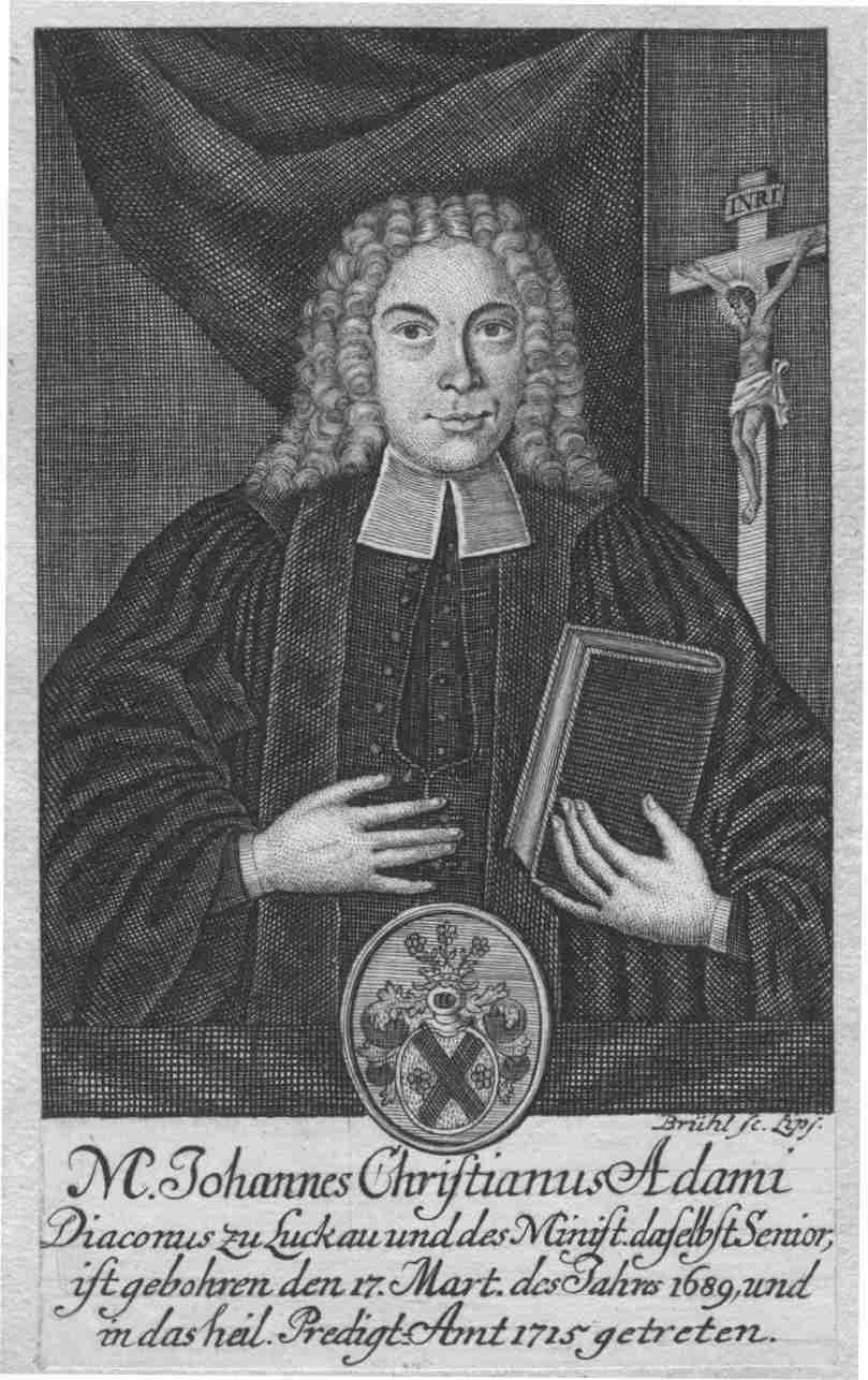 Johann Christian Adami (1689-1753), Kupferstich, Bild: 144x85 mm M[agister] Johannes Christianus Adami Diaconus zu Luckau und des Minist[erii] daselbst Senior, ist gebohren den 17. Mart. des Jahres 1689, und in das heil. Predigt-Amt 1715 getreten.